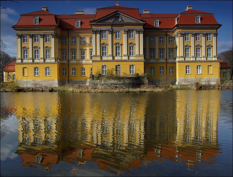 zespół pałacowy, 1713-1722, nr rej.: 806/J z 4.01.1984: pałac, nr rej.: A/5392/505 z 24.08.1959